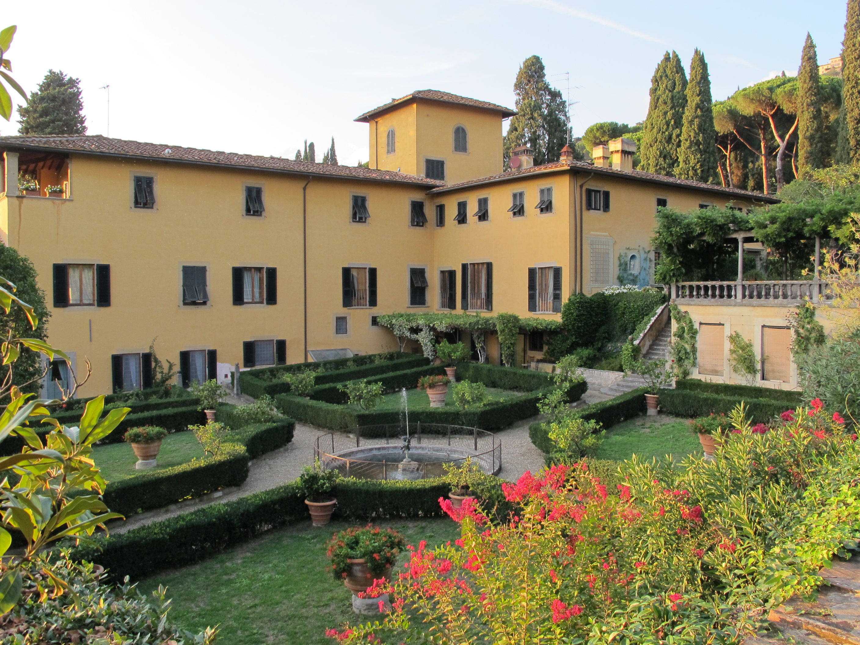 Villa sparta, giardino formale inferiore